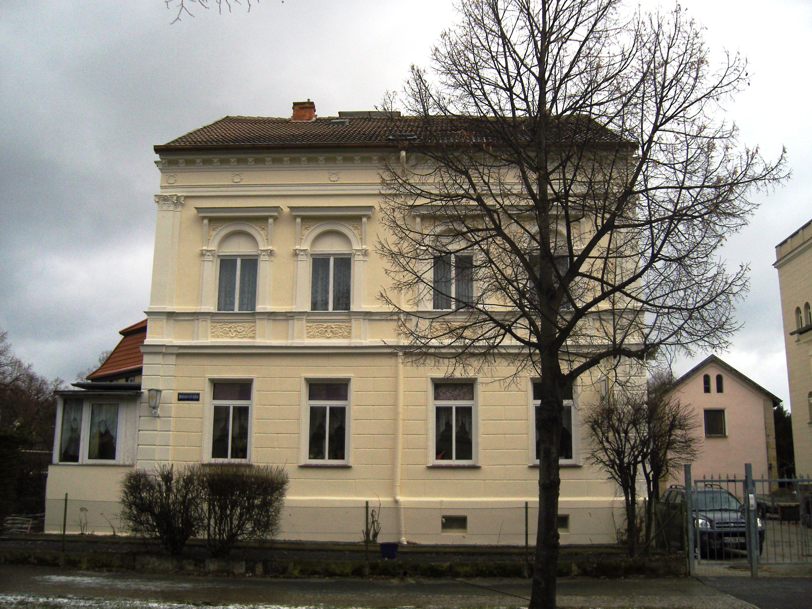 Denkmalgeschützte Villa Weberstraße 30 in Quedlinburg